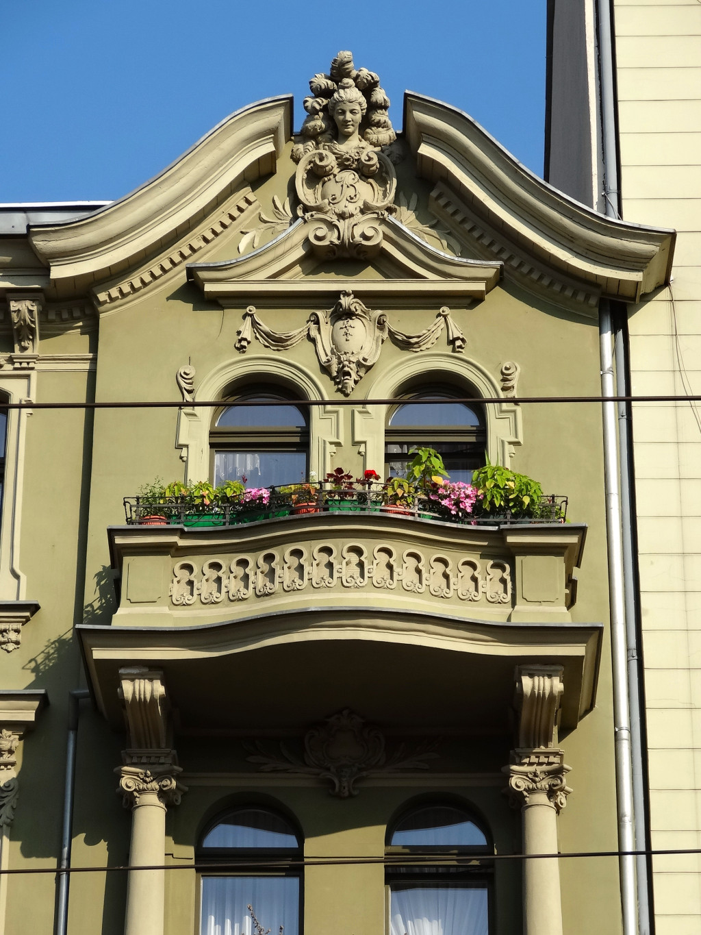 Kamienica przy ul. Gdańskiej 93 w Bydgoszczy (1895-1897, aut. Józef Święcicki)